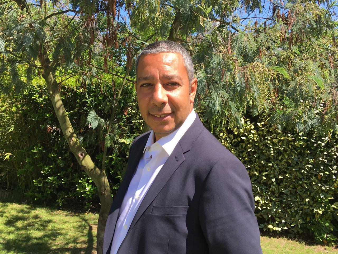 Mon portrait